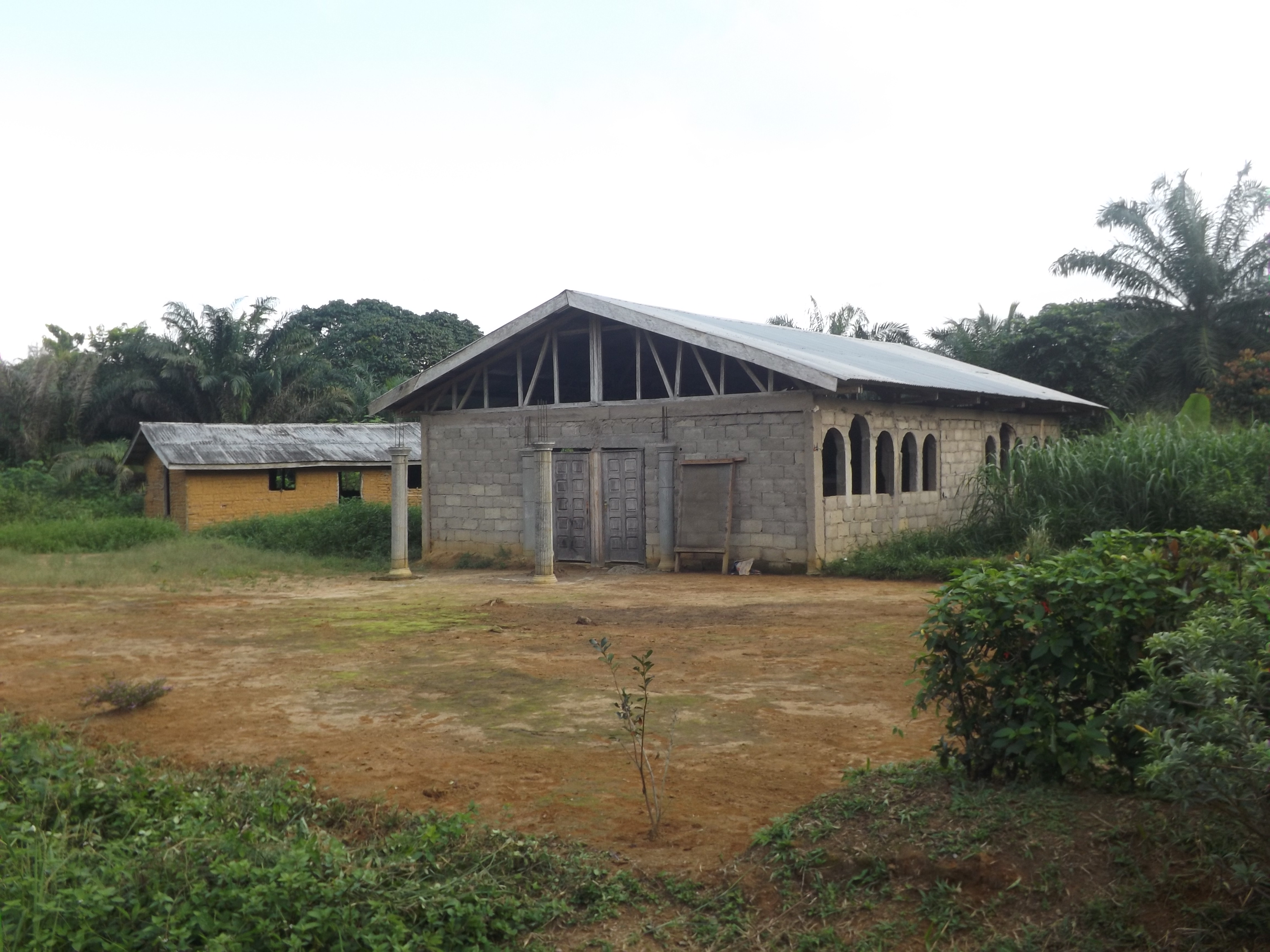 Église presbytérienne de Tayap (Cameroun), en construction.